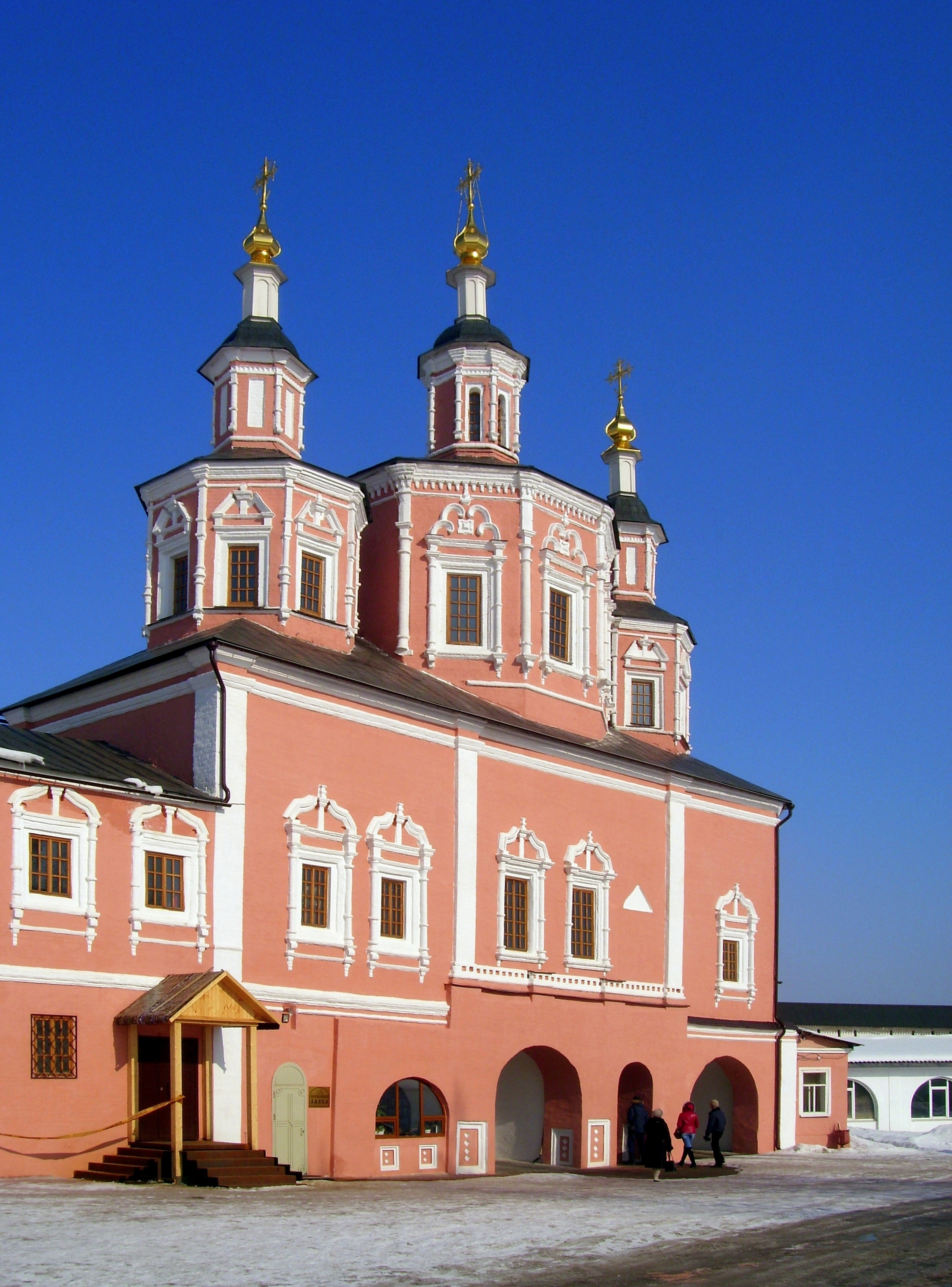 Церковь Сретения Господня (Брянская область, Брянск, посёлок Супонево)